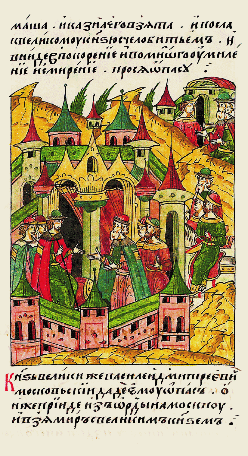 что казна его захва- чена, послал с чело- битьем к великому князю, покорился ему с умилением и смире- нием, прося охранной грамоты Князь вели- кий Василий Дмитриевич Московский дал ему охранную грамоту, и тот пришел из Орды в Москву, и заключил мир с великим князем.